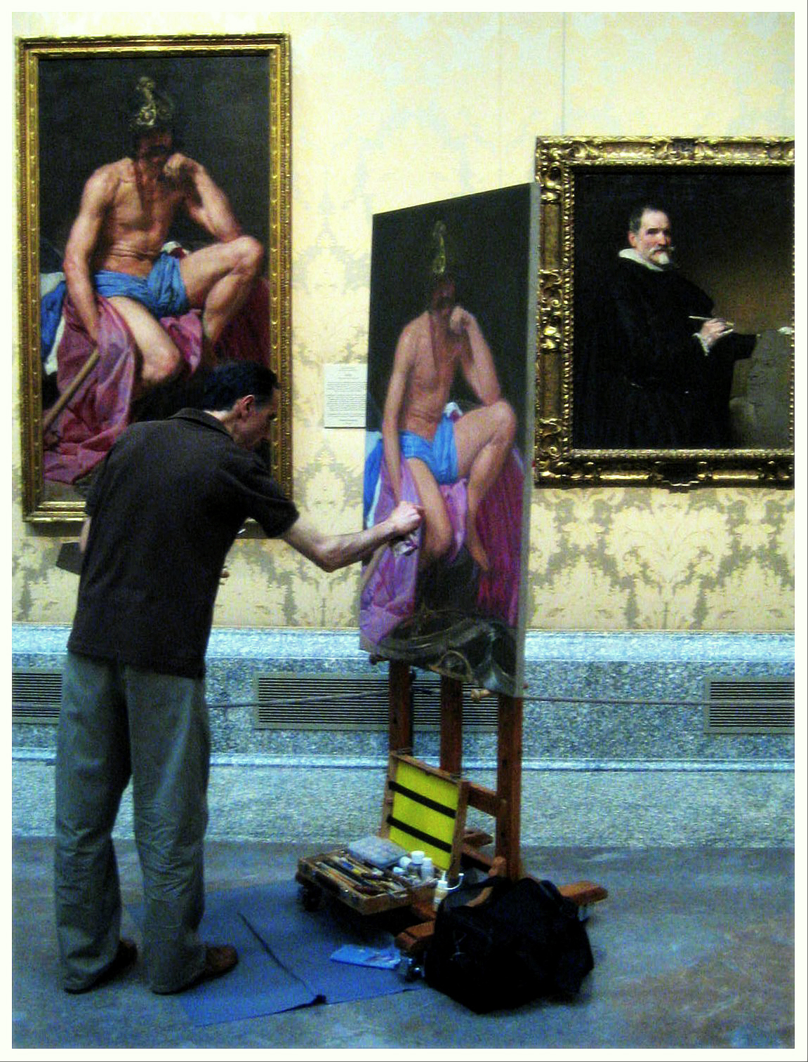 Original : El dios Marte, de Velazquez, en la Sala 12 del Museo del Prado, Madrid.